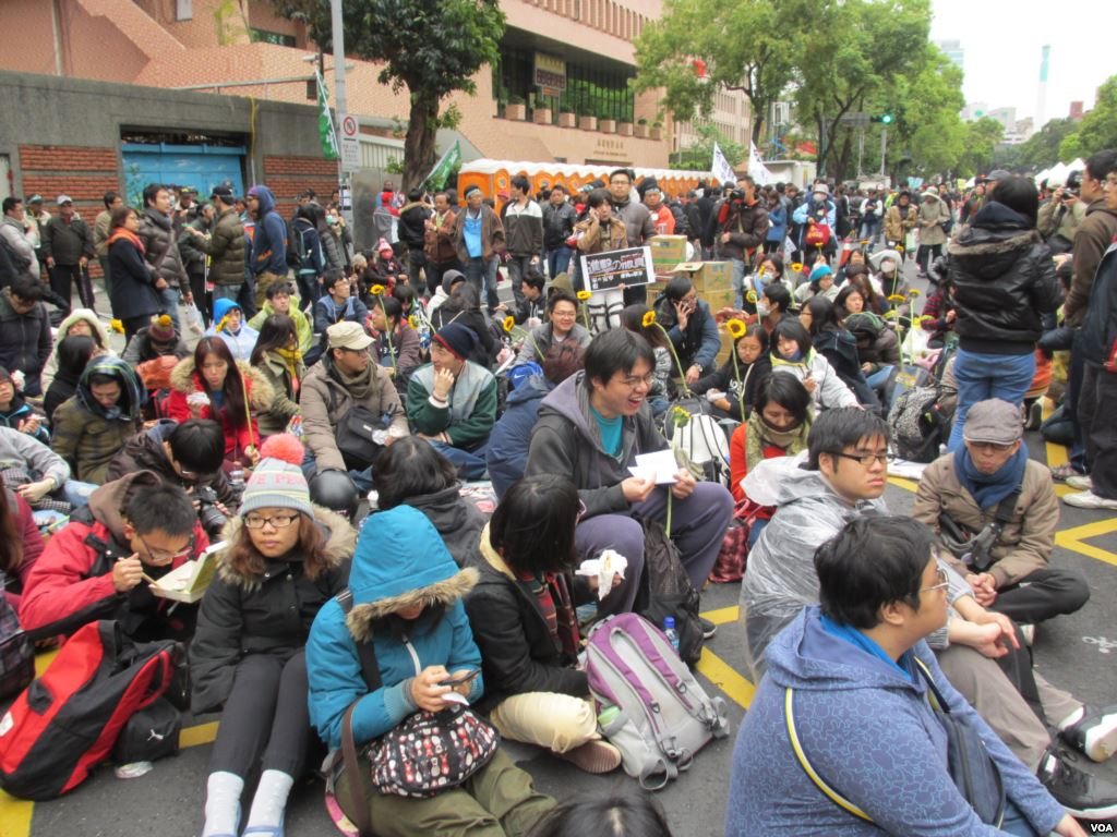 在立法院外抗議的學生。